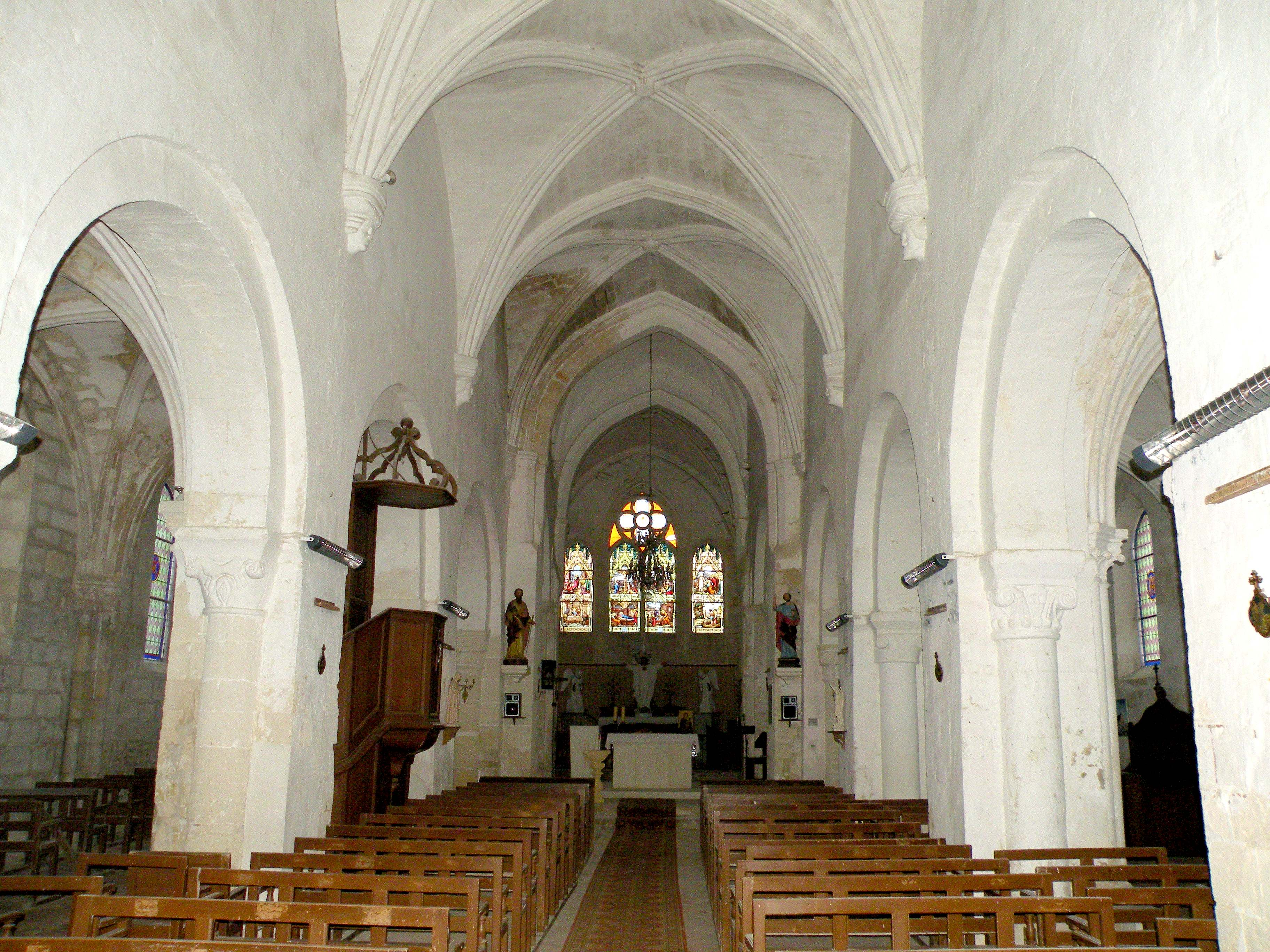 Intérieur de l'église Saint-Pierre-Saint-Paul d'Arronville